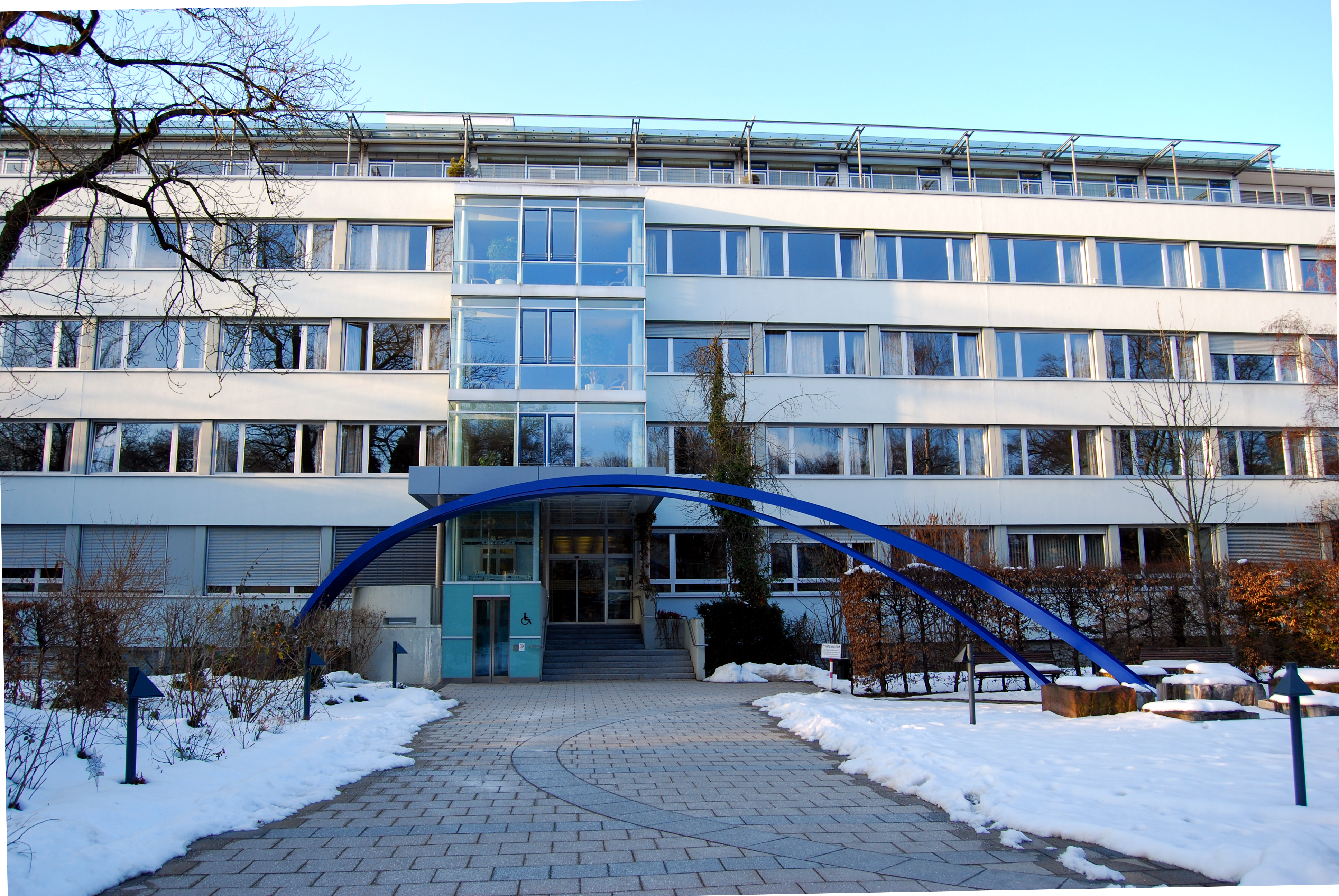 Krankenhaus Neuwittelsbach in München-Neuhausen.